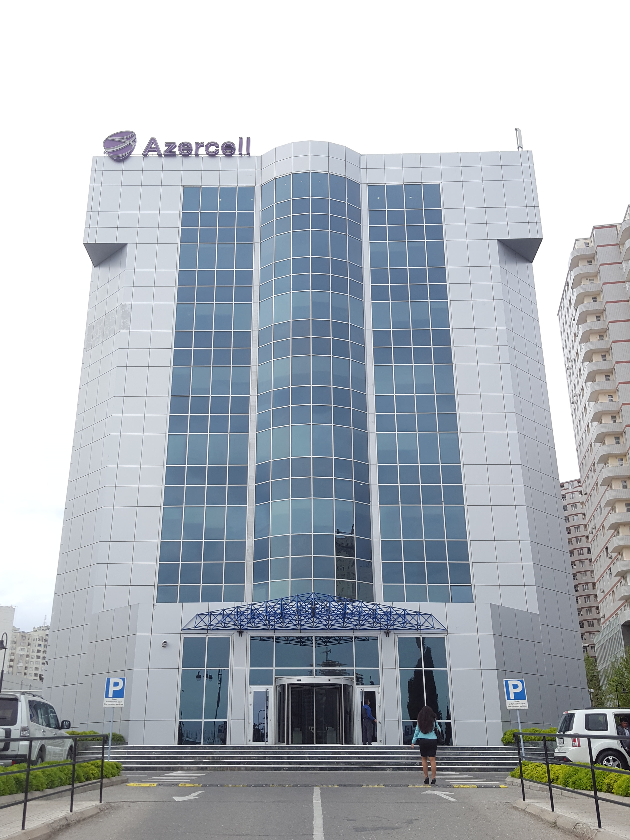 Azercell Plaza